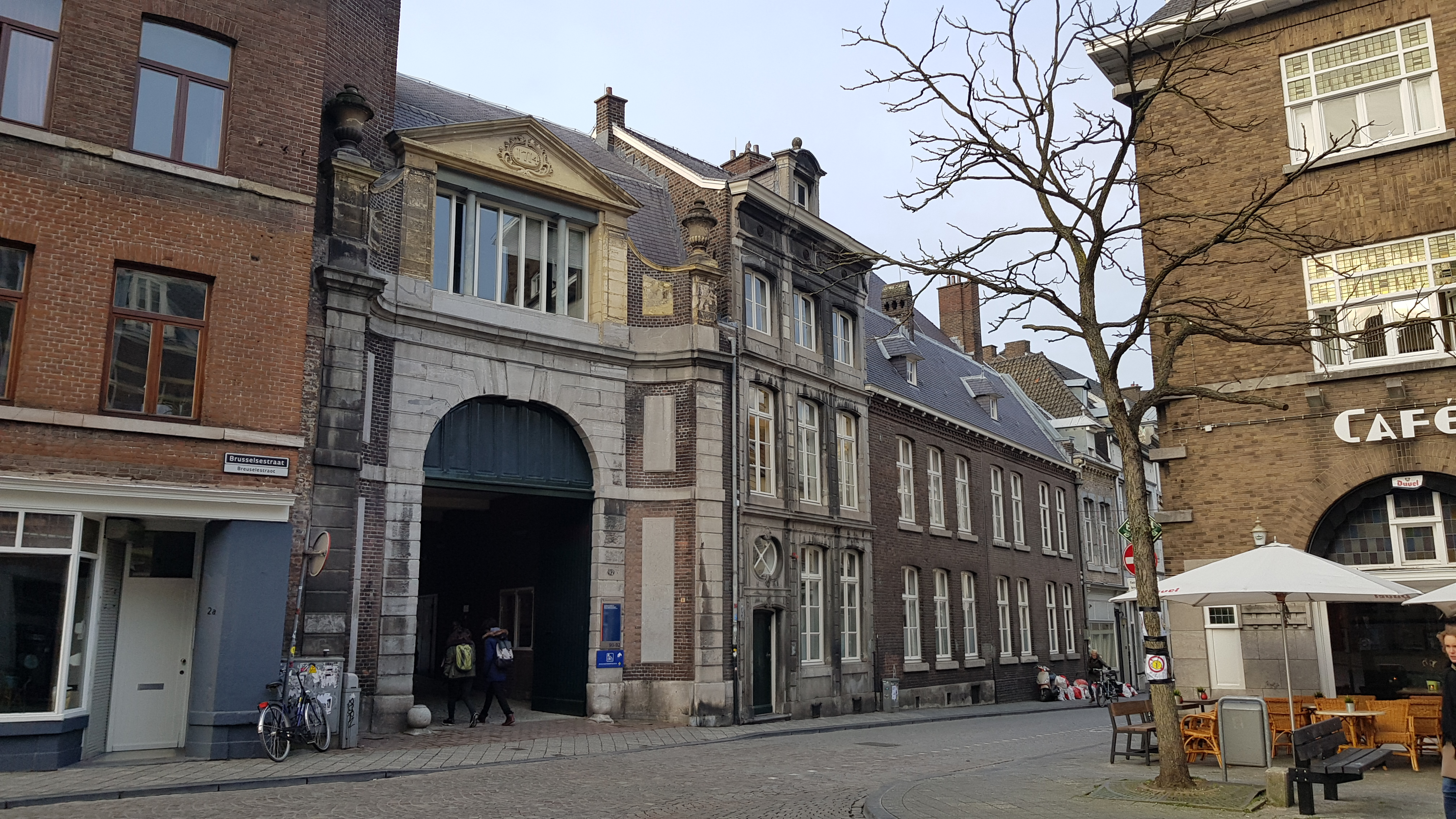 Hof van Tilly, Maastricht, Nederland